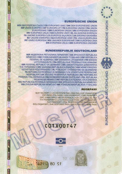 Passkartentitelseite des deutschen Reisepasses von Erika Mustermann (Muster 2017).